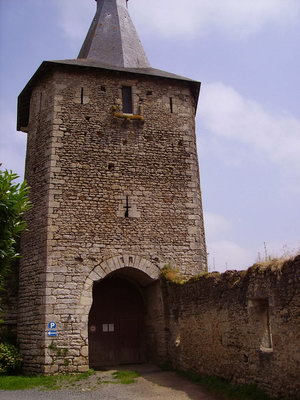 Tour-porte du château d'Airvault